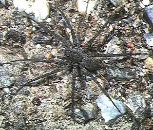 male Pardosa jambaruensis from Okinawa.